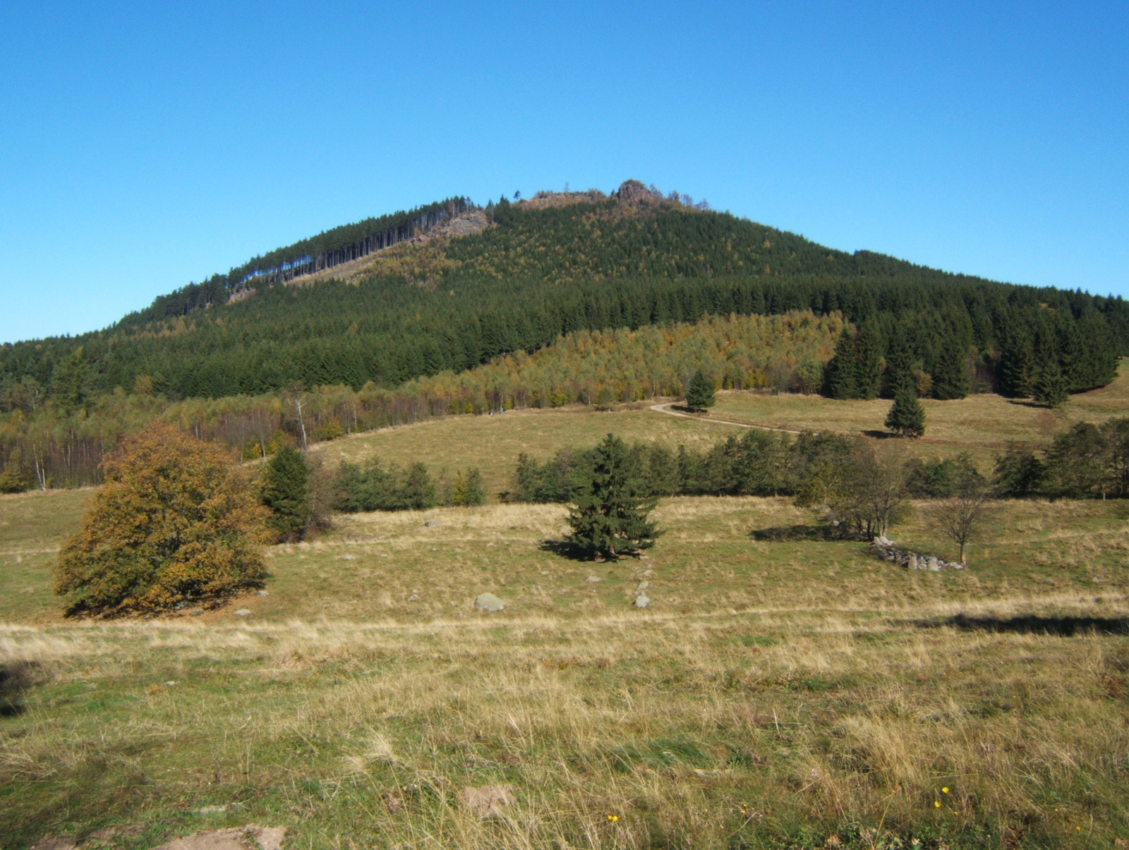 Der Große Hermannsberg, Thüringer Wald, Deutschland